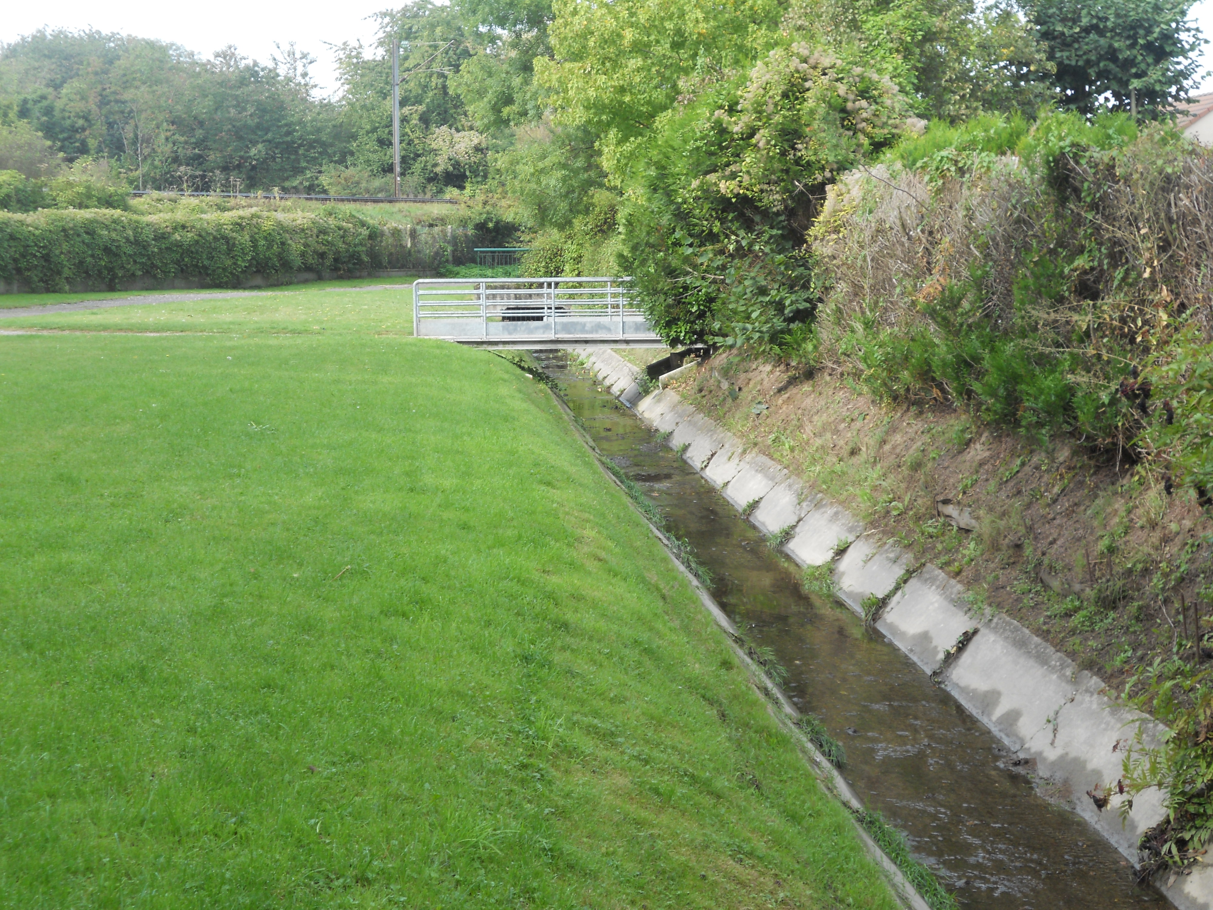 Le petit rosne (Parc des Coquelicots)